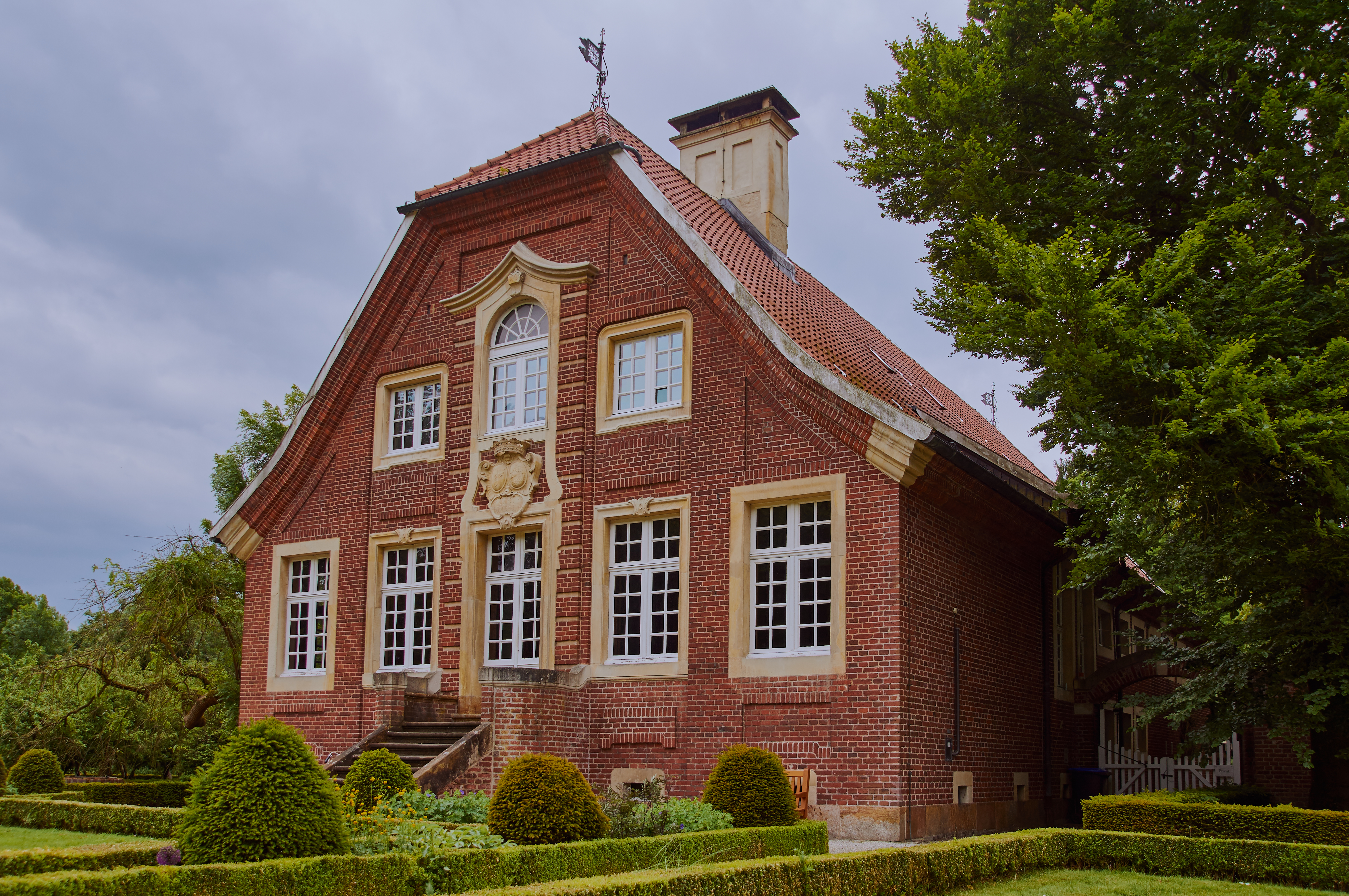 Das von 1745 bis 1748 nach Entwürfen von Johann Conrad Schlaun erbaute Rüschhaus in Nienberge im westfälischen Münster war zeitweise Wohnsitz von Annette von Droste-Hülshoff. This is a photograph of an architectural monument.It is on the list of cultural monuments of Münster (Westfalen)